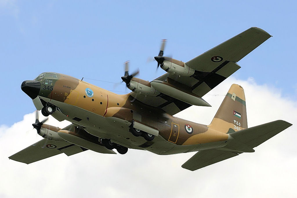 C-130 Hercules - RIAT 2004